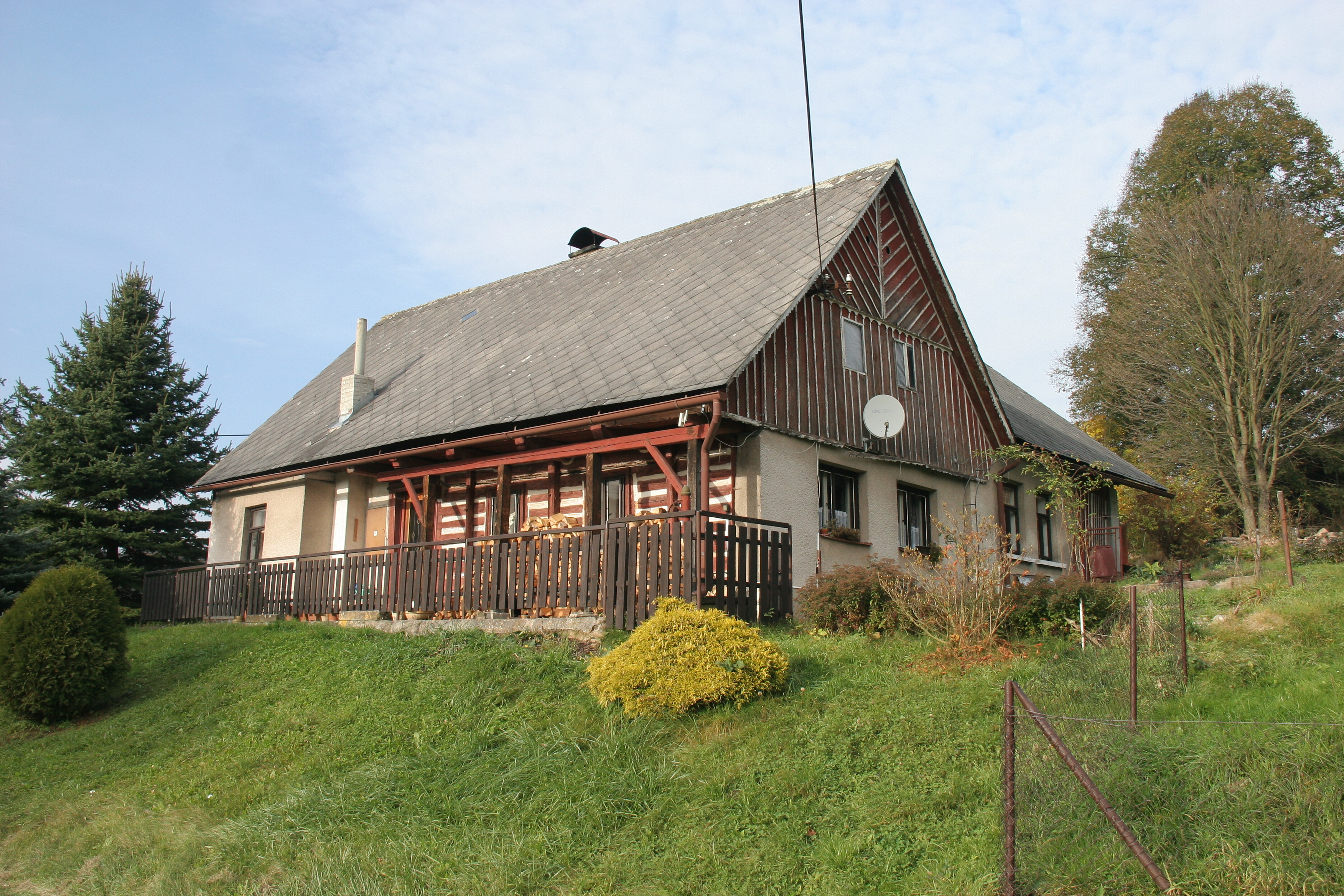 Borovnička 131